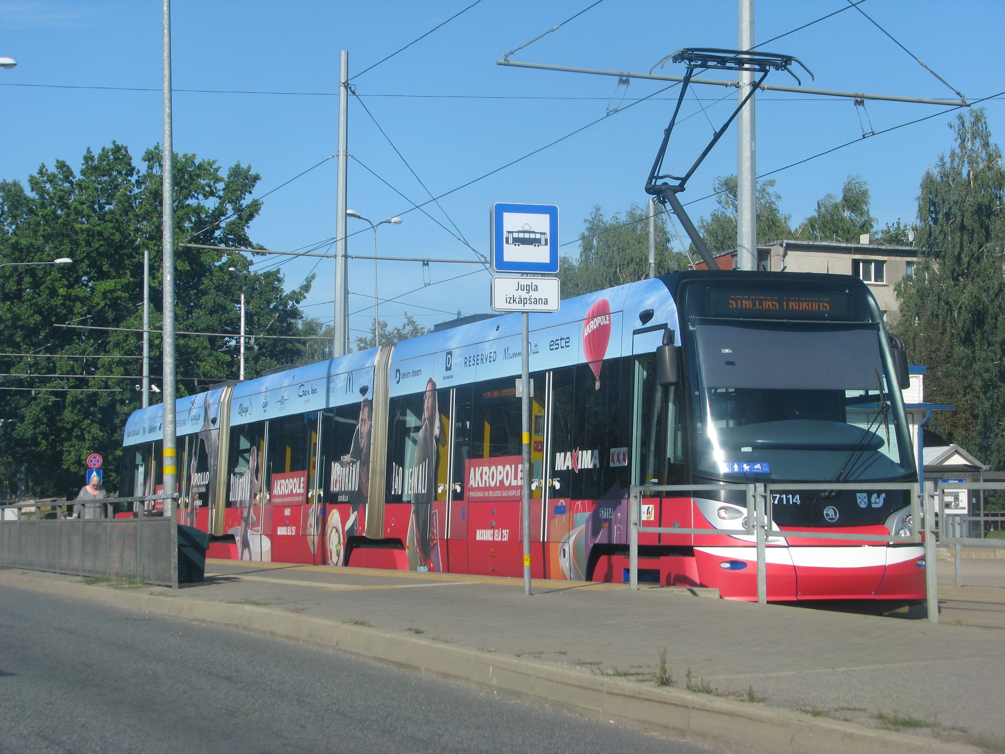 1. maršruta (Jugla-Stacijas laukums) tramvajs Juglas tramvaju galapunkta izkāpšanas zonā.